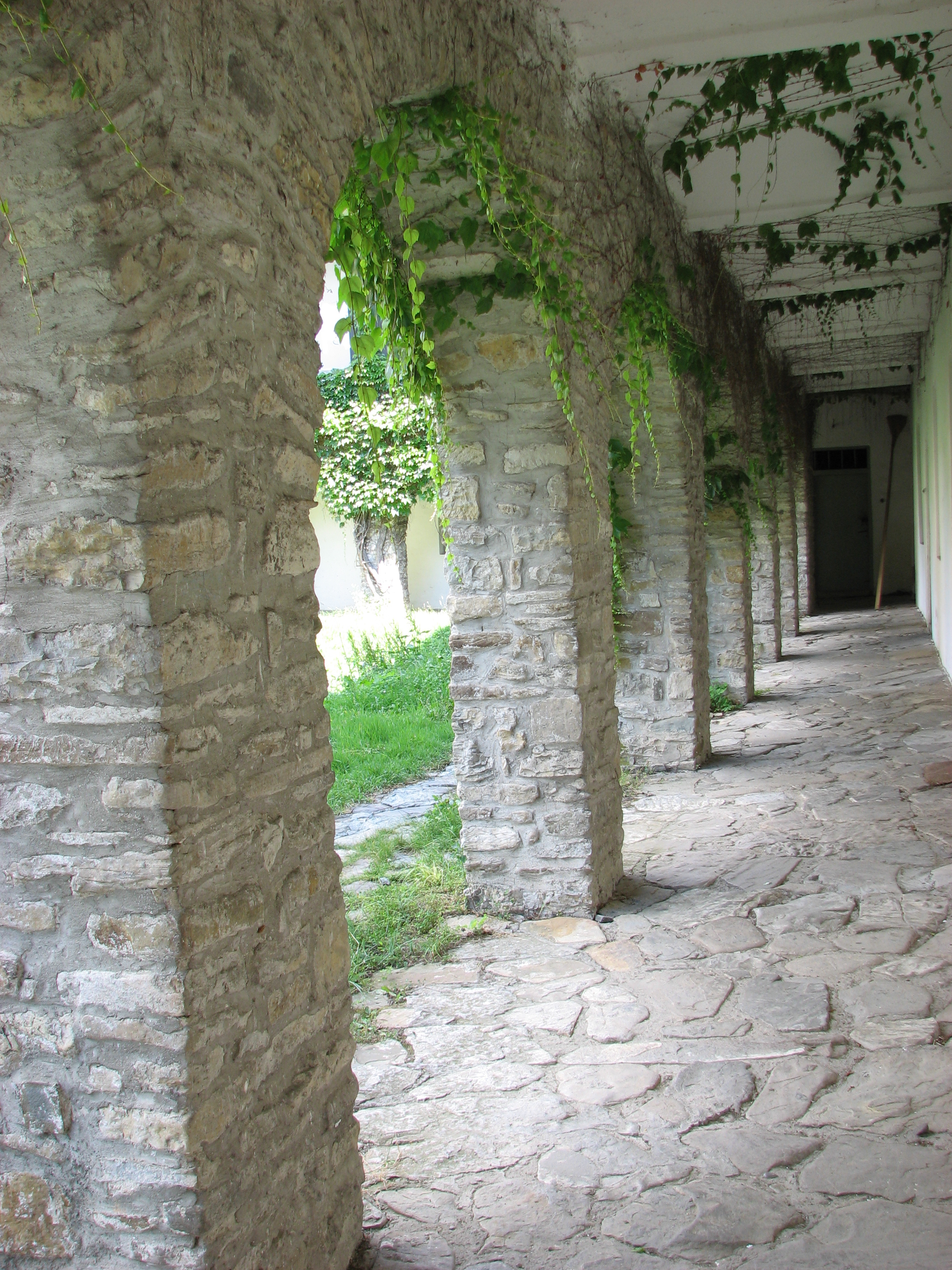 Manastirea Neamtului - July 2008